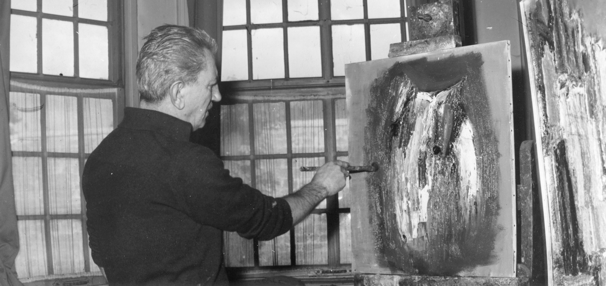 Pierre Bosco peignant dans son atelier